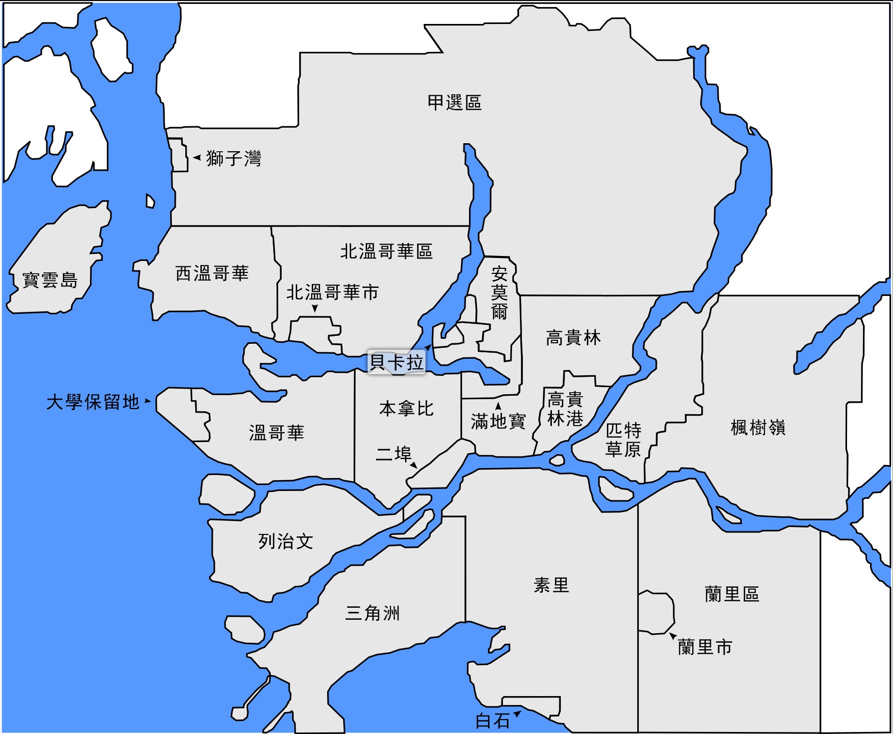 大溫哥華區域局轄下城鎮。本圖是由Qyd繪製的png檔案衍生而成。